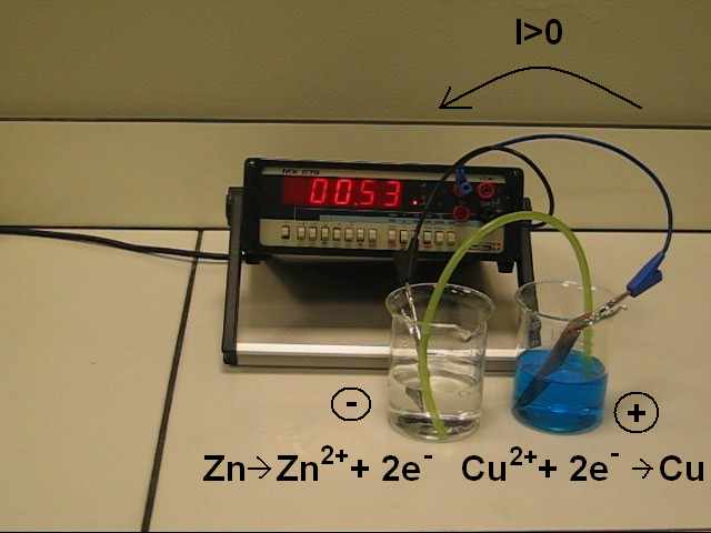 Pile Daniell qui débite